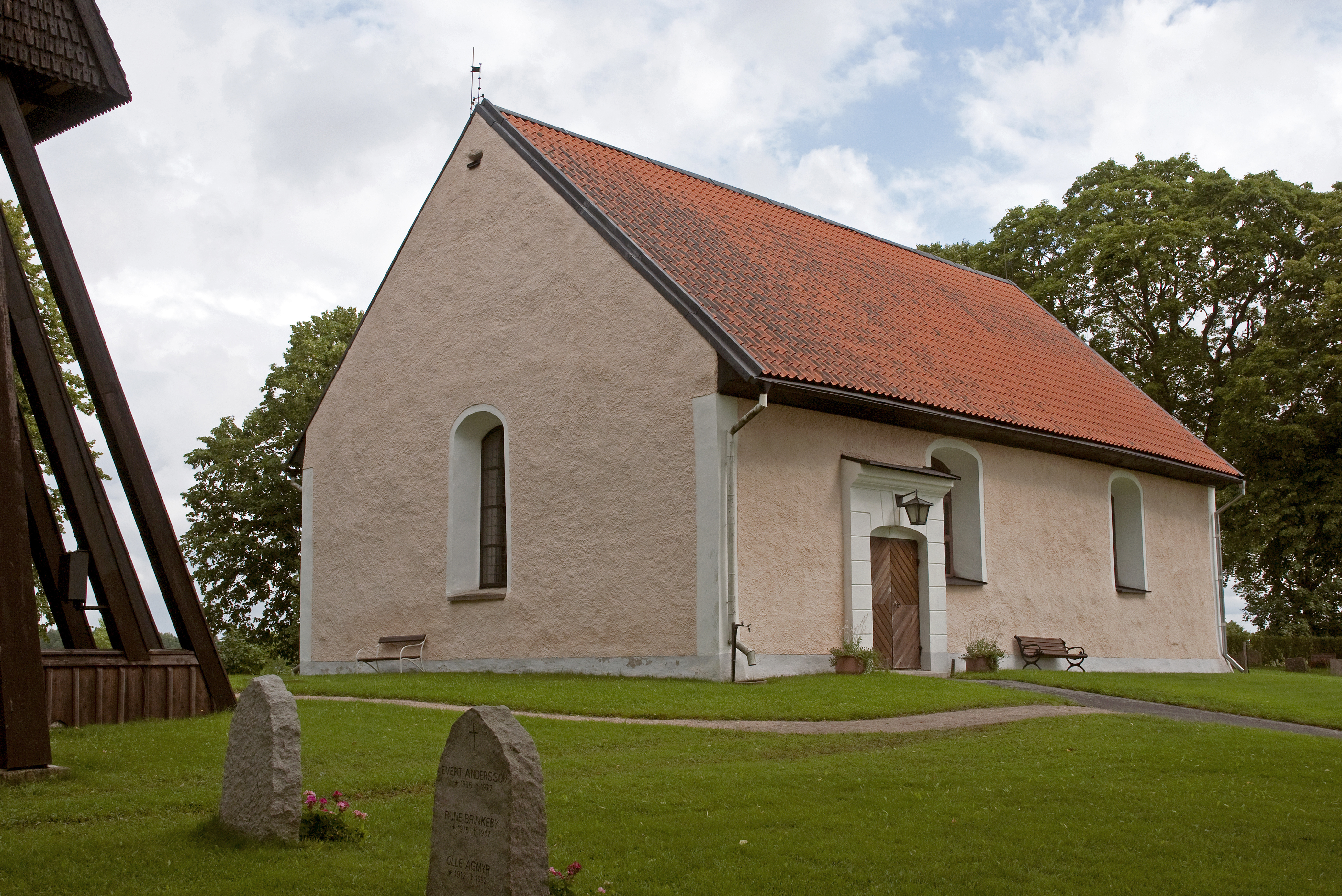 Bergshammars kyrka i Nyköpings kommun.